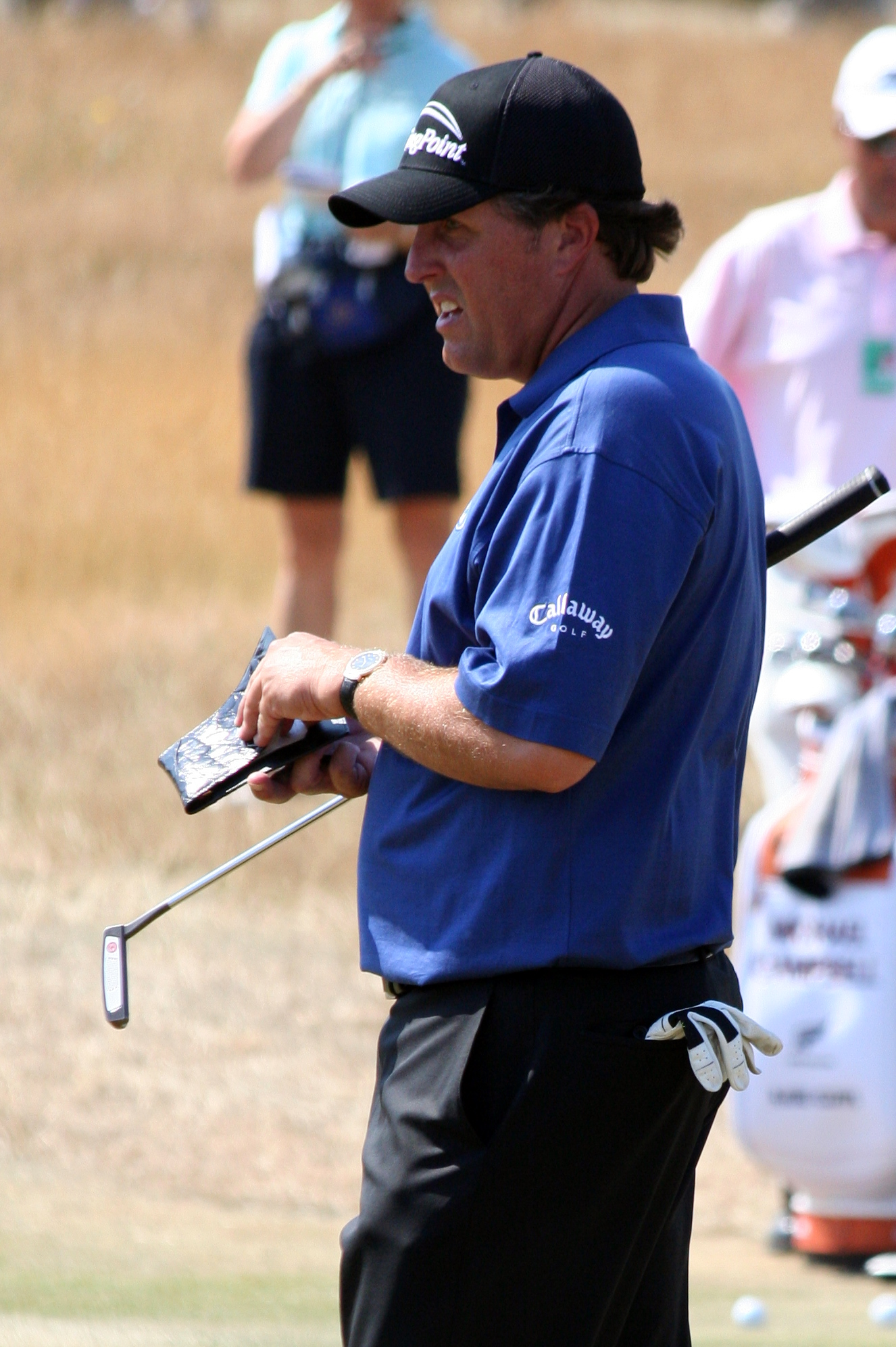 Phil Mickelson, Open 2006